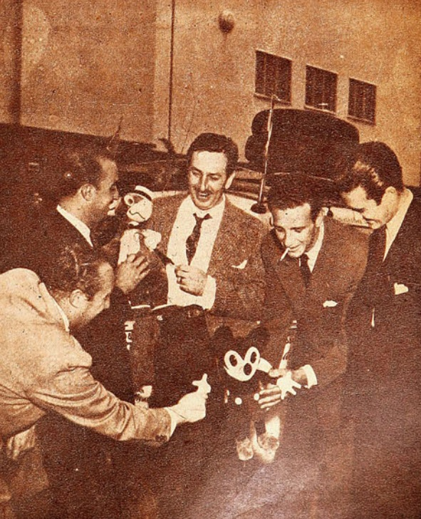 Mauricio Wainer, Pedro Sáez, Aurelio Pozo y Juan Riera del Club Deportivo Universidad Católica se reunieron en 1947 con Walt Disney, como parte de una travesía en carretera desde Santiago de Chile a New York, USA.